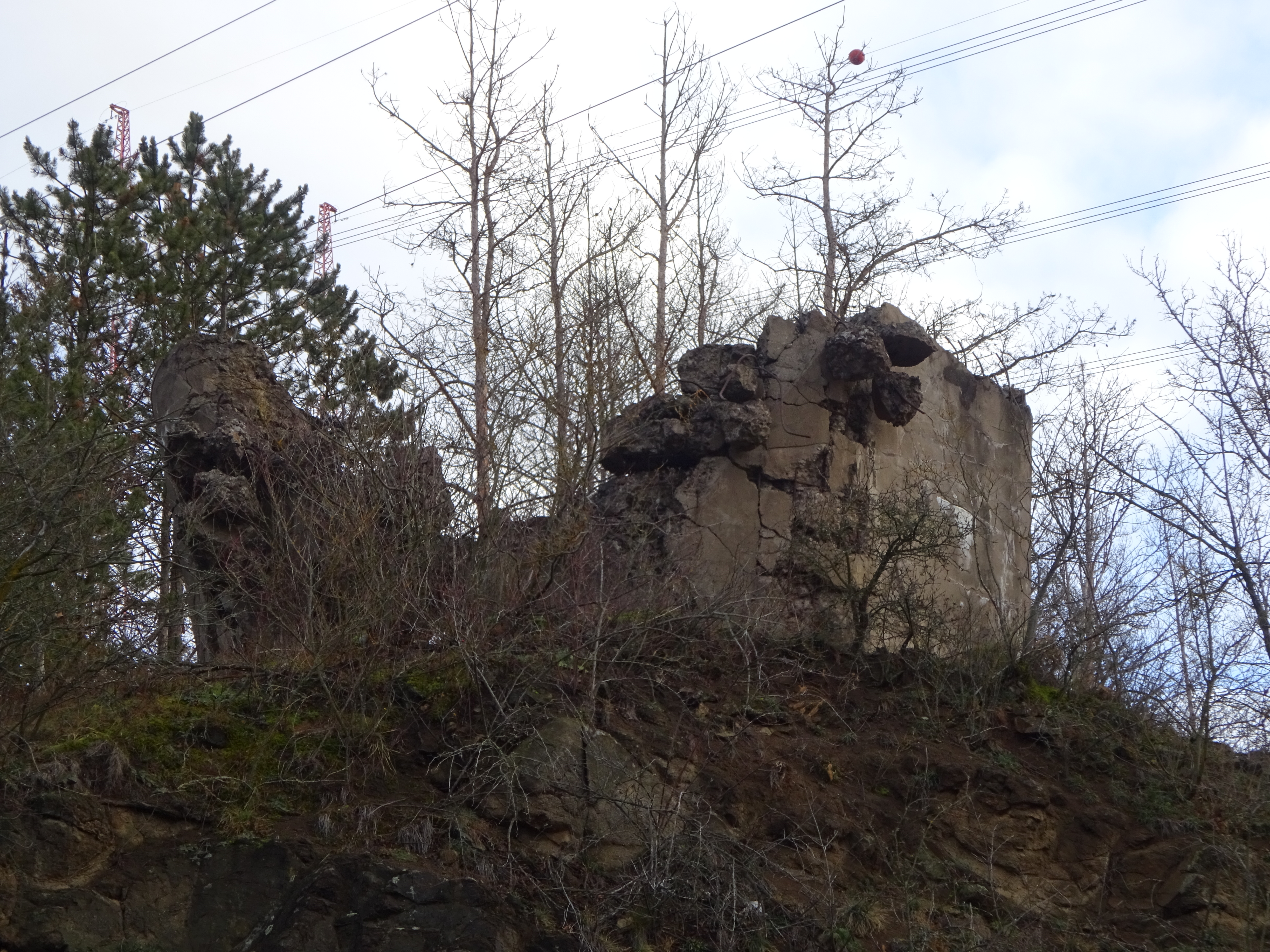 Beroun, Lištice, rozstřelený řopík